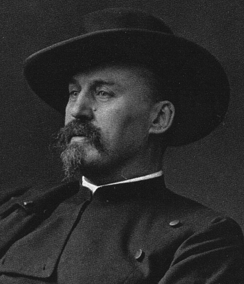 Porträtfoto, ca. 1900